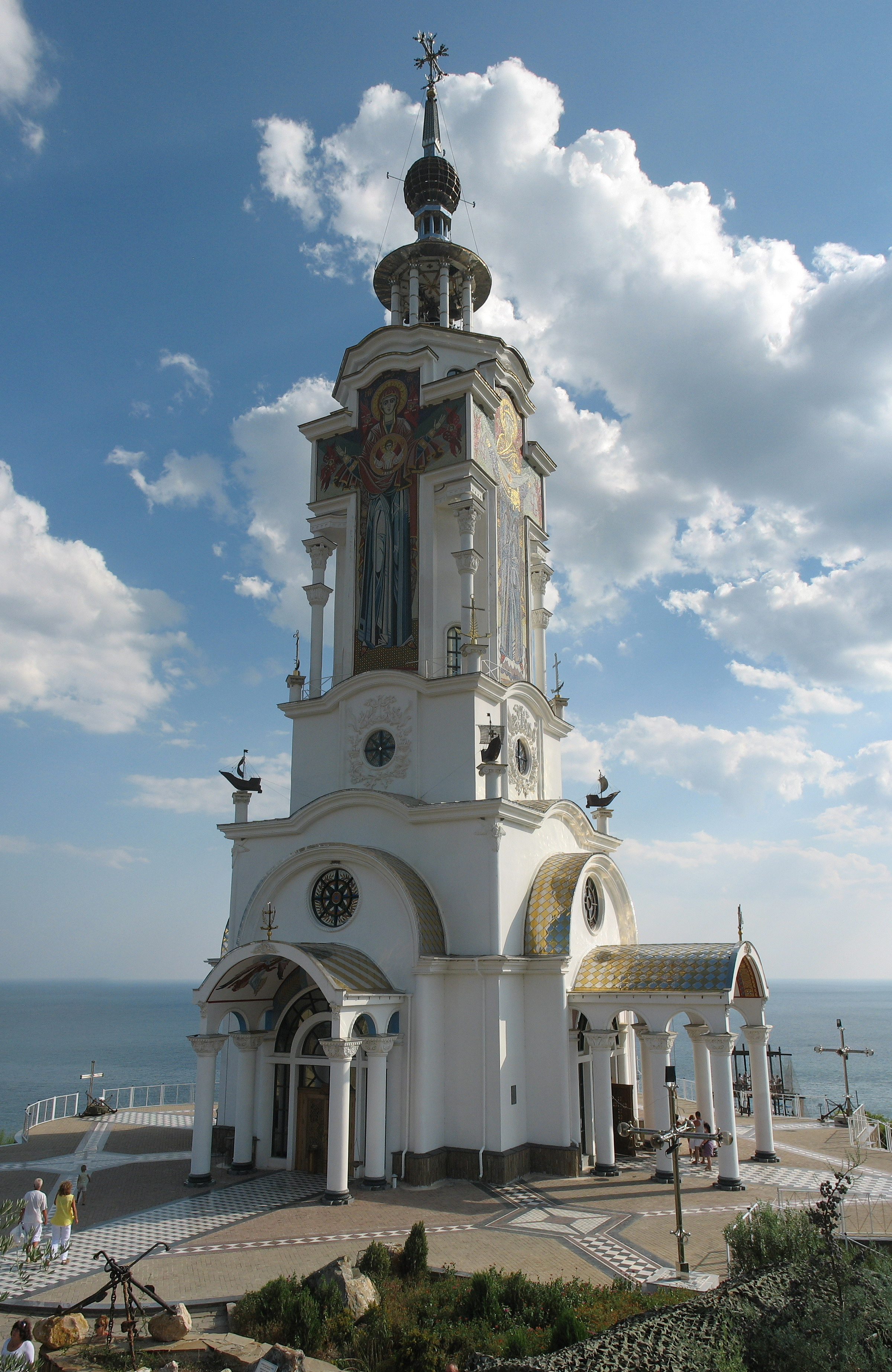 Храм-маяк Святого Николая Мирликийского.jpg